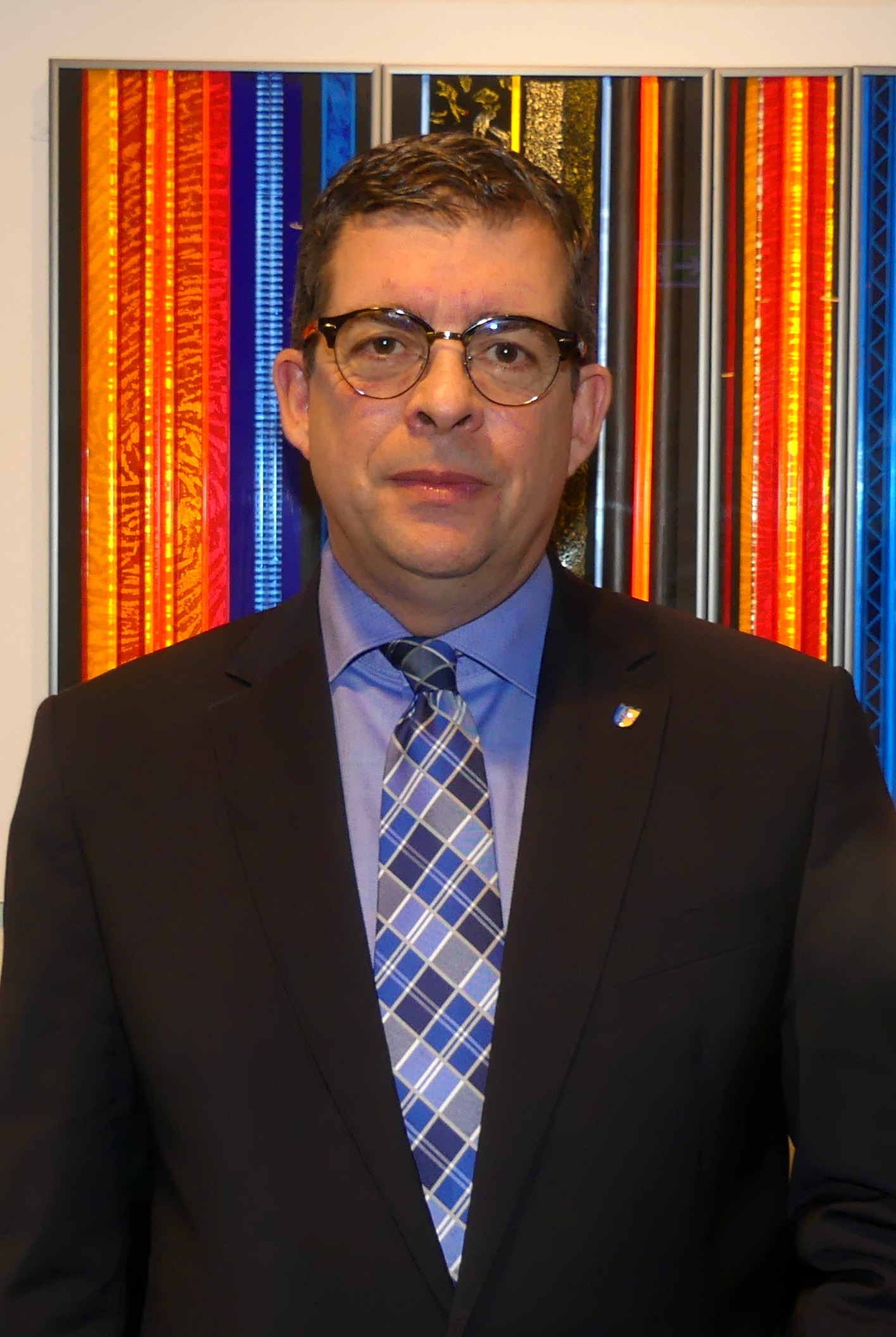 Bürgermeister Frank Helmenstein